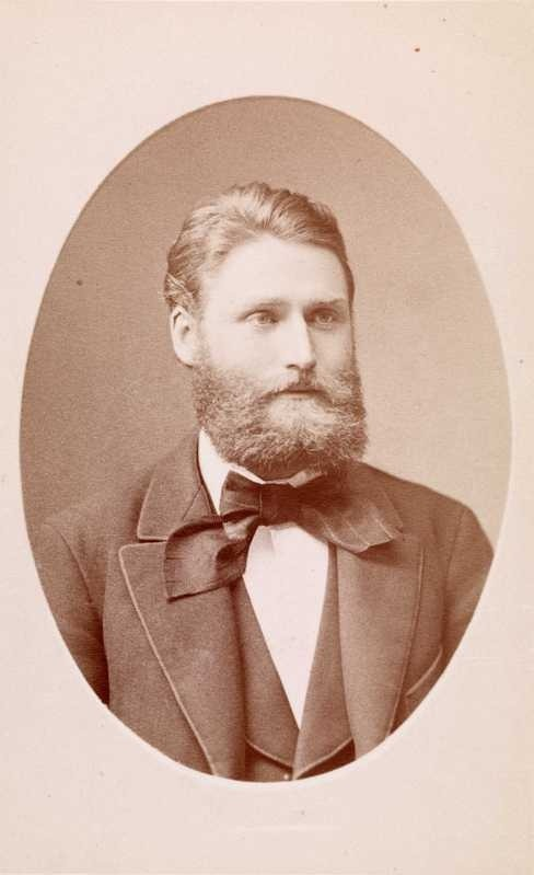 Andreas Aubert, portrett, mann, kunsthistoriker, brystbilde.